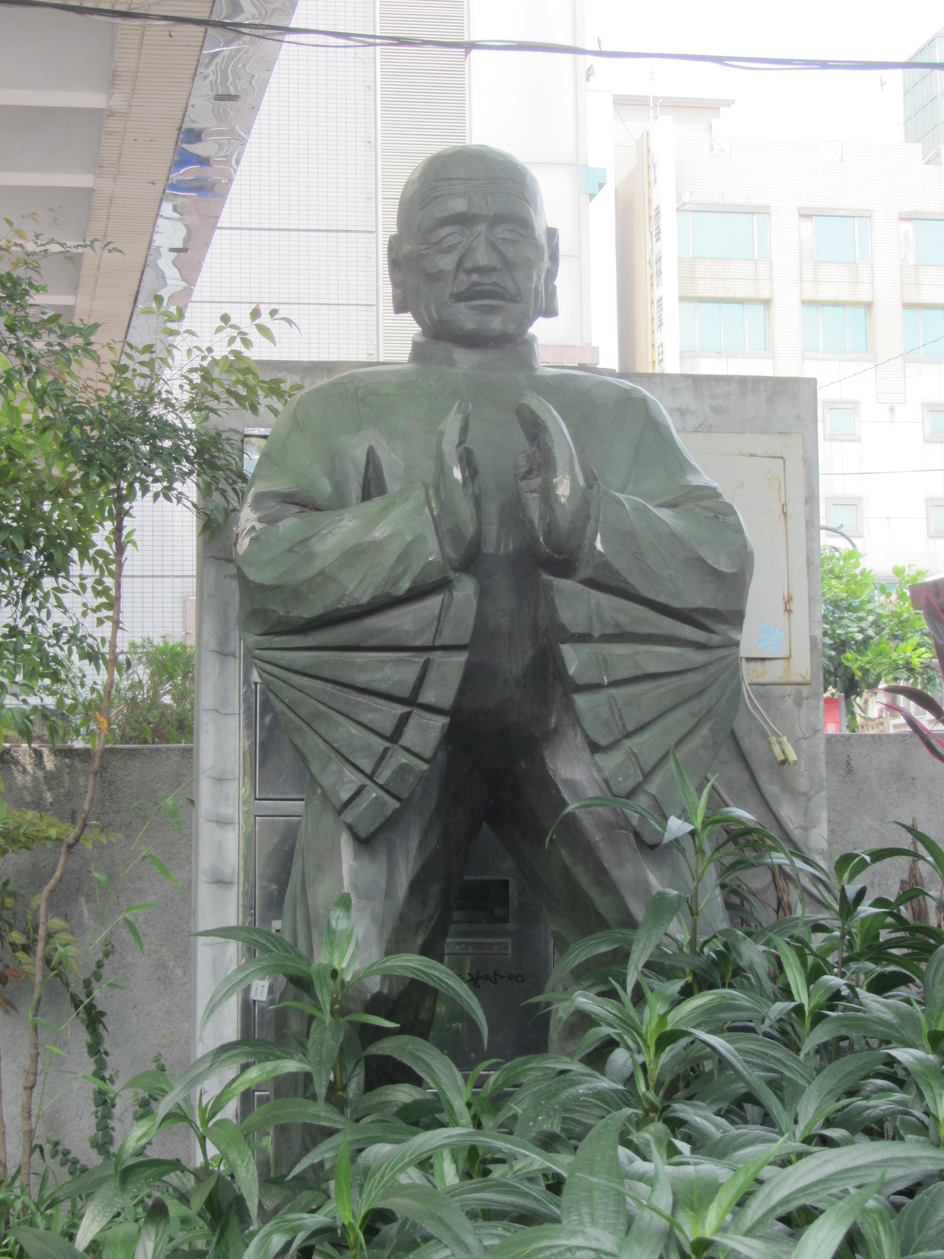 位於雲林縣虎尾鎮雲林布袋戲館內的黃海岱雕像